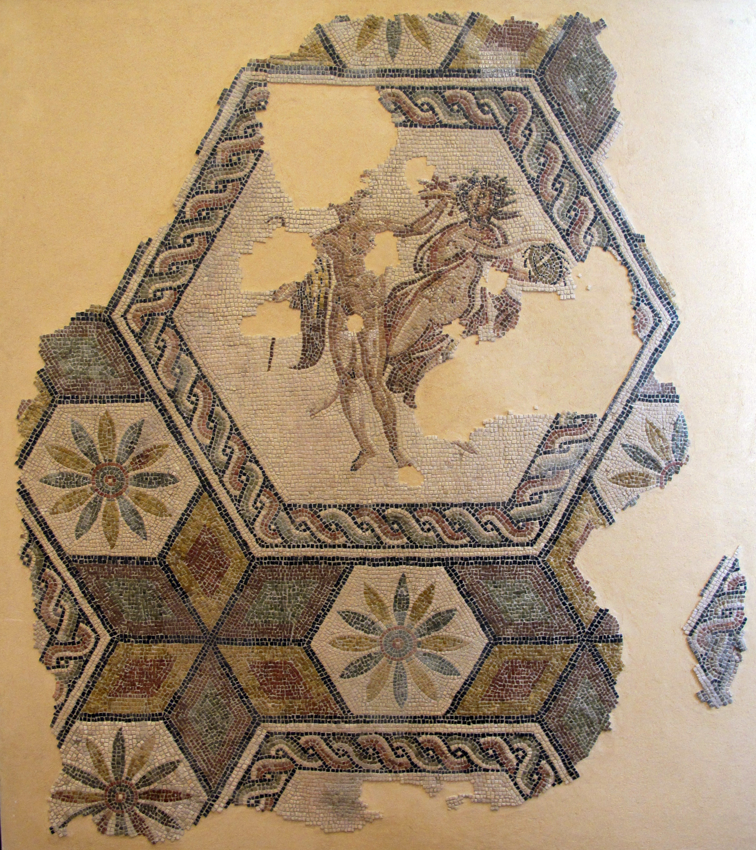 Rimini, mosaico tardoimperiale con due figure